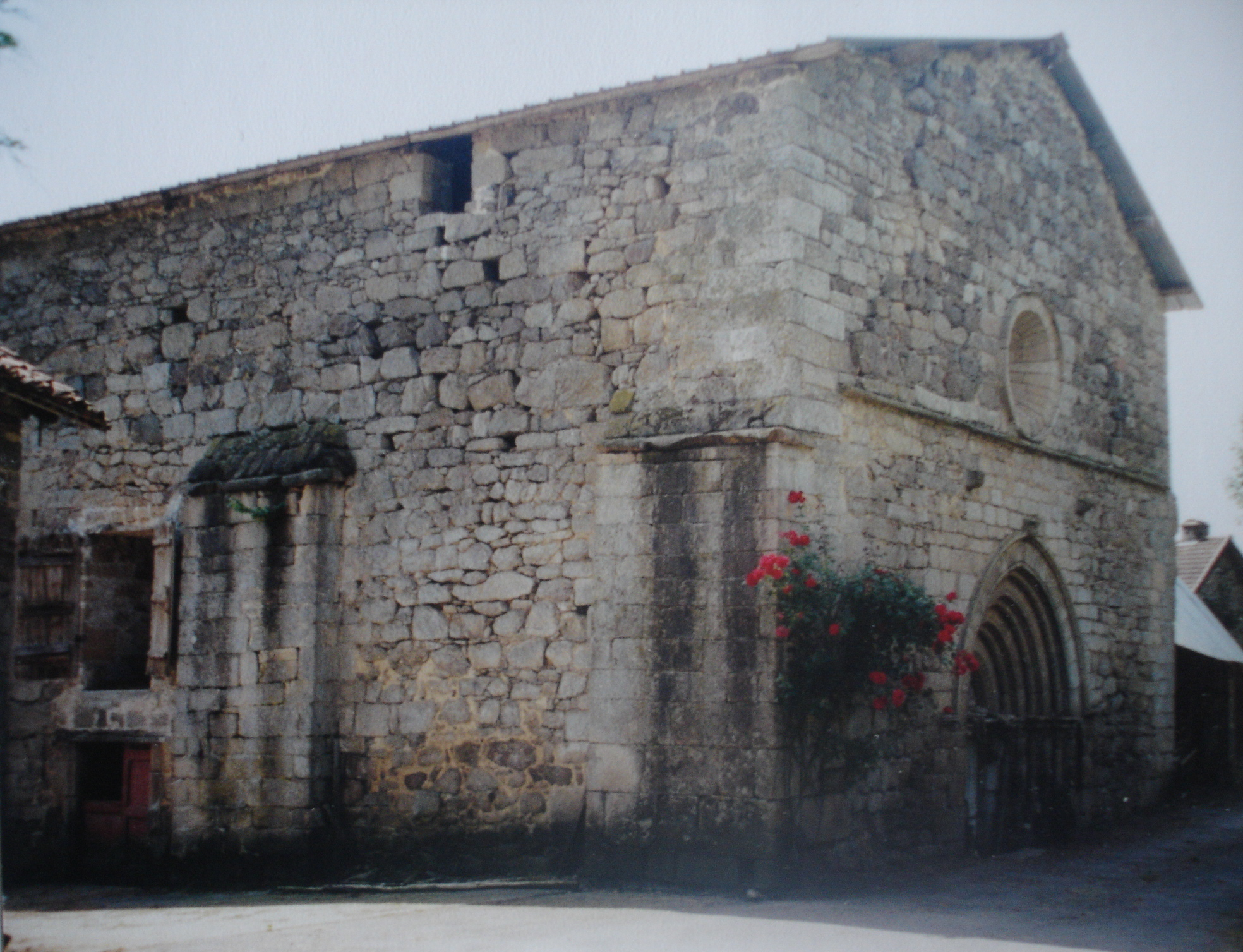 Sainte Anne Saint Priest : l'église-prieuré de Villevaleix (XIIe siècle)